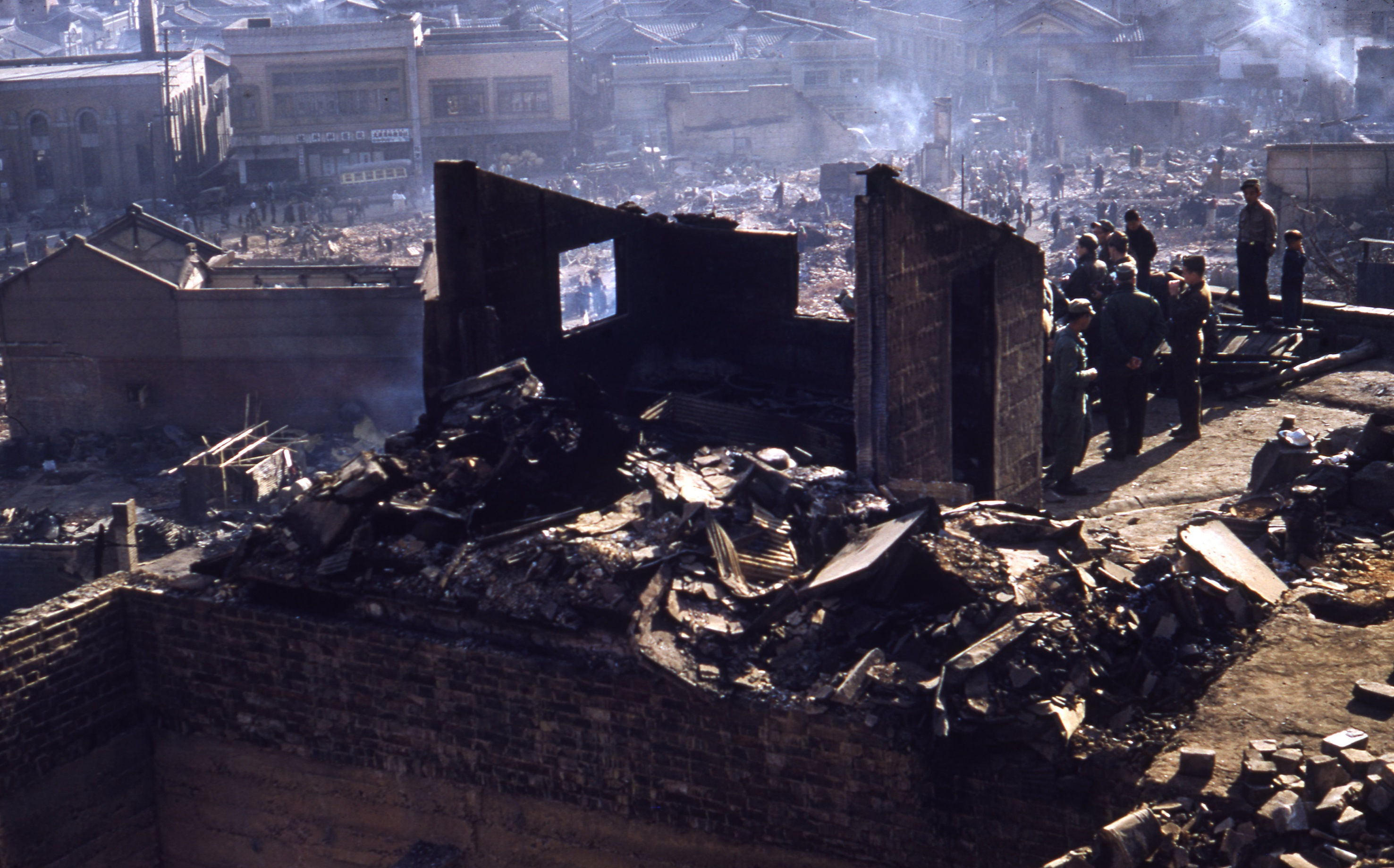 1953년 부산 역전대화재 직후 화재 감식차 살펴보는 군인들